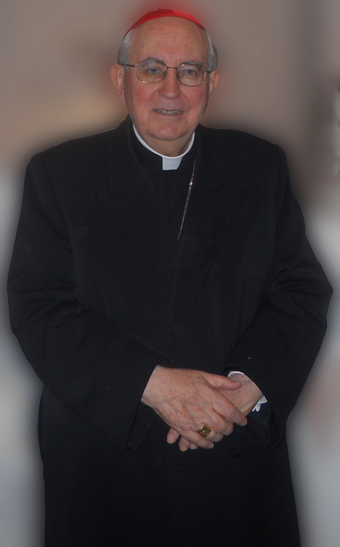 Agostino Cardinal Vallini